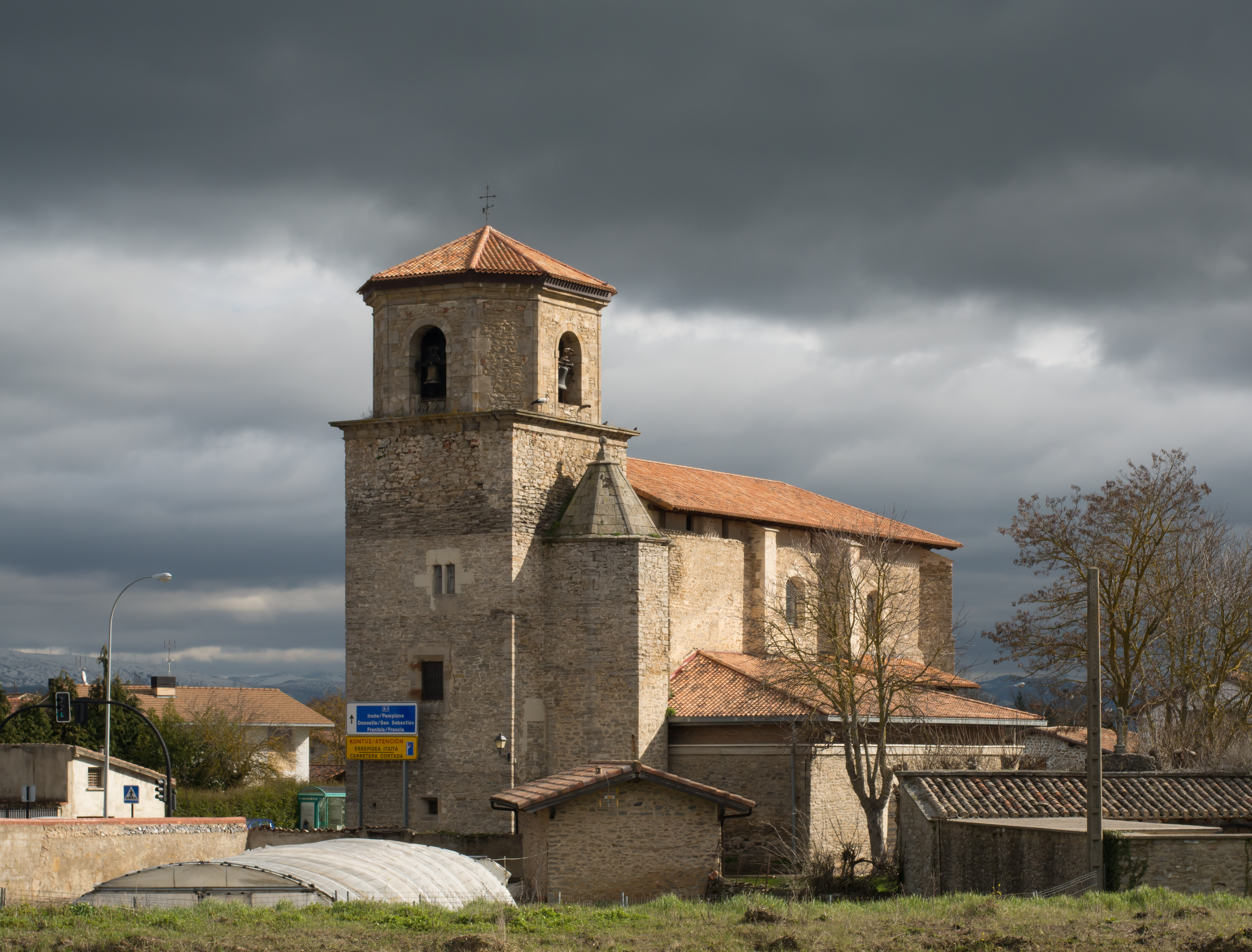 Iglesia de Elorriaga. Vitoria-Gasteiz, País Vasco, España